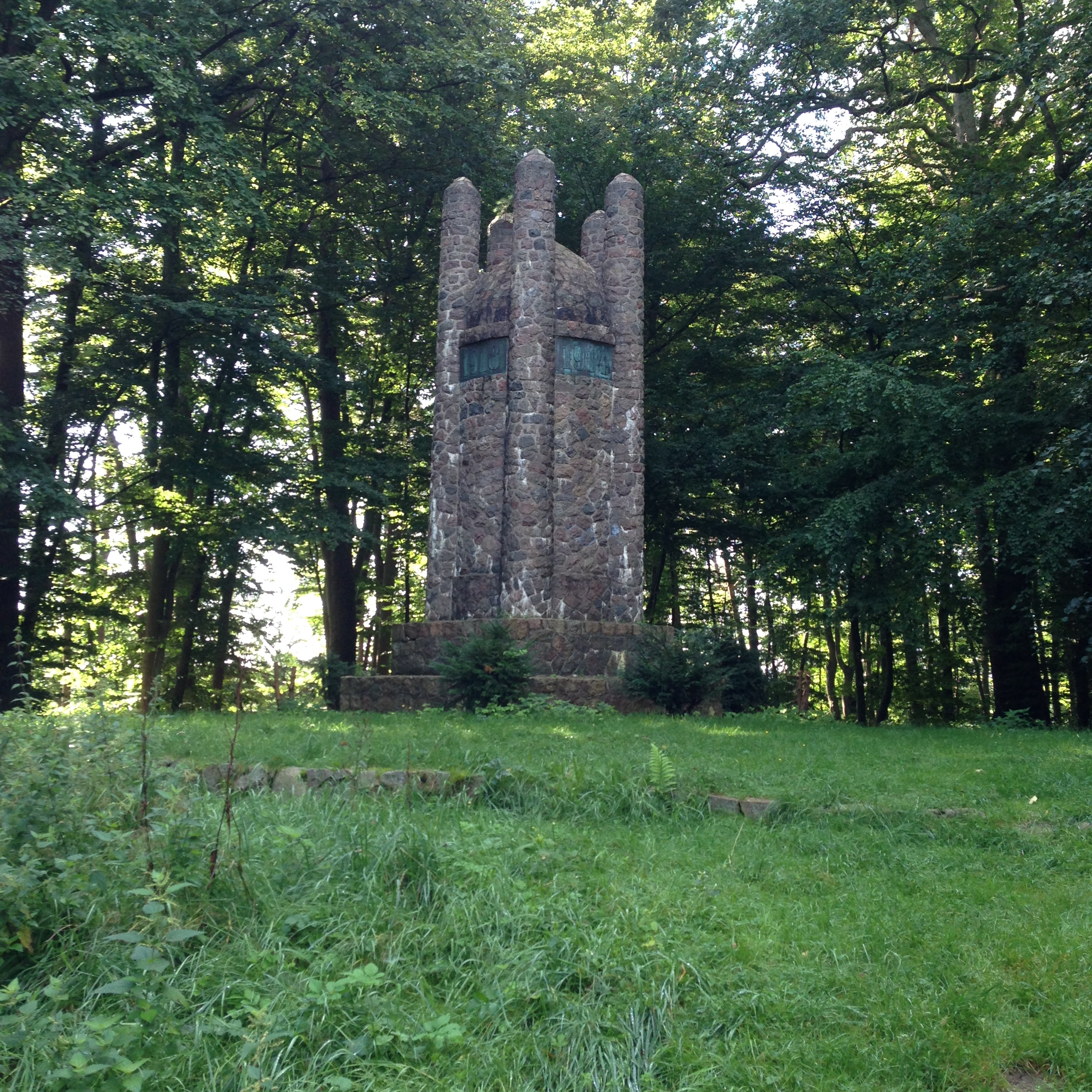 Erinnerungsmal Erster Weltkrieg von Harry Maasz in Mölln